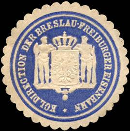 Sealing stamp Title: Königliche Direction der Breslau - Freiburger Eisenbahn Description: blau, weiß, geprägt Place: size: 4 cm